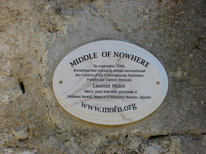 Plaque "Middle of Nowhere" posée sur le mur de l'église de Rochefourchat